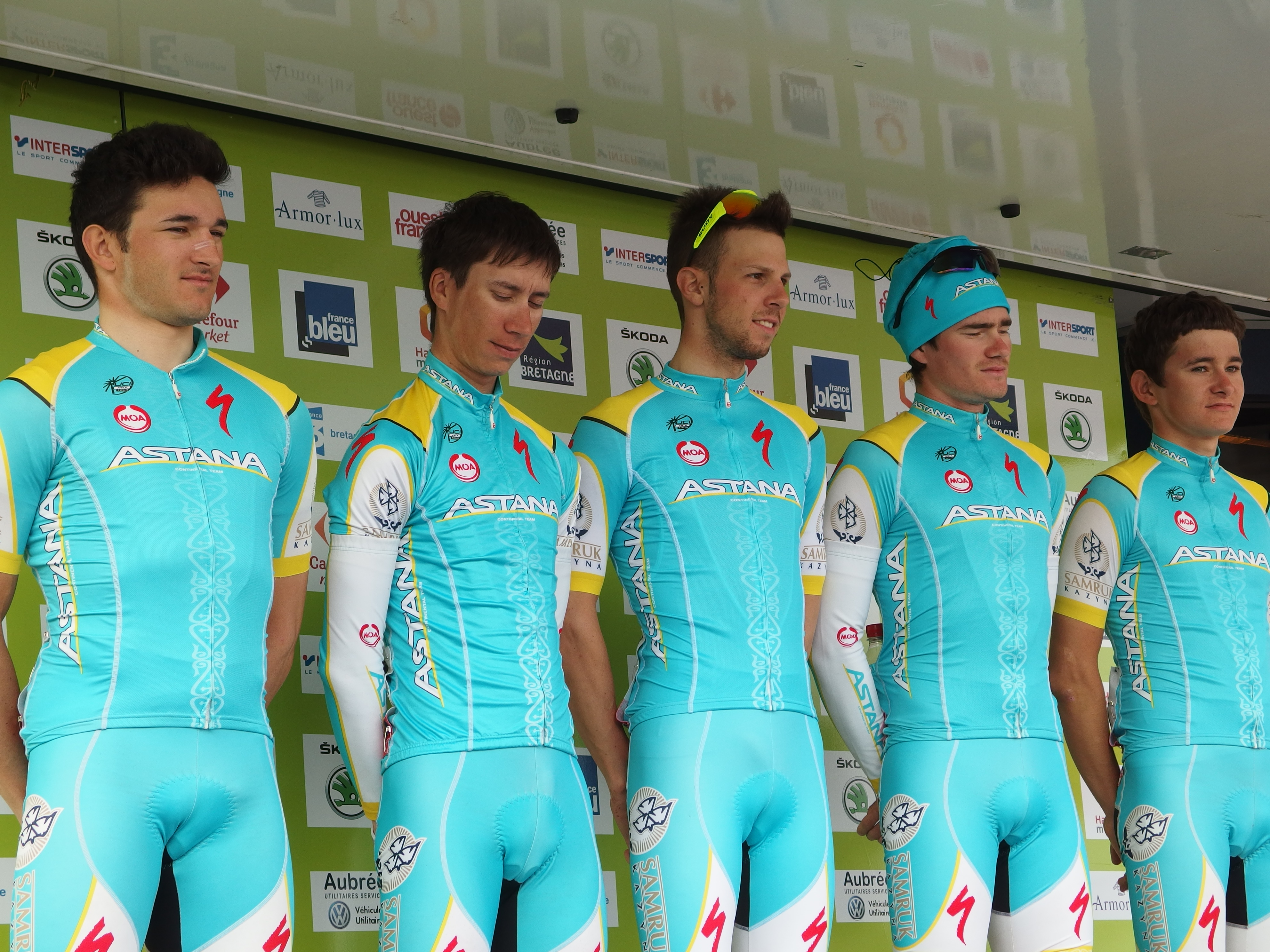 Tour de Bretagne 2014 - Présentation des équipes au départ de la sixième étape à Radenac - Équipe Astana Continental Depicted people: Marco Benfatto, Pavel Gatskiy, Michele Scartezzini, Vadim Galeyev and Sergey Shemyakin